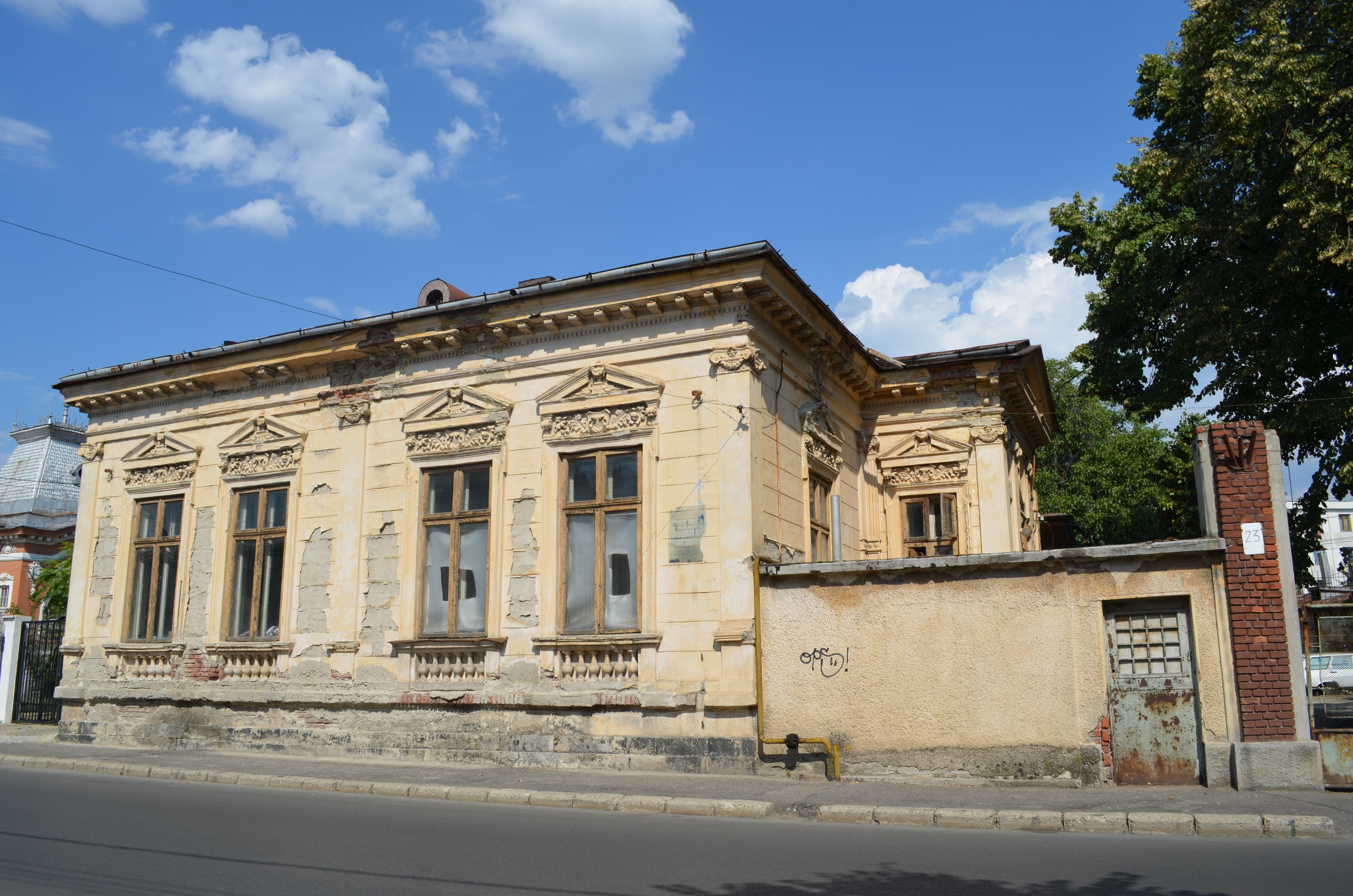 Casa Viorel Voiculescu, Str. Democrației nr. 23, Ploiești